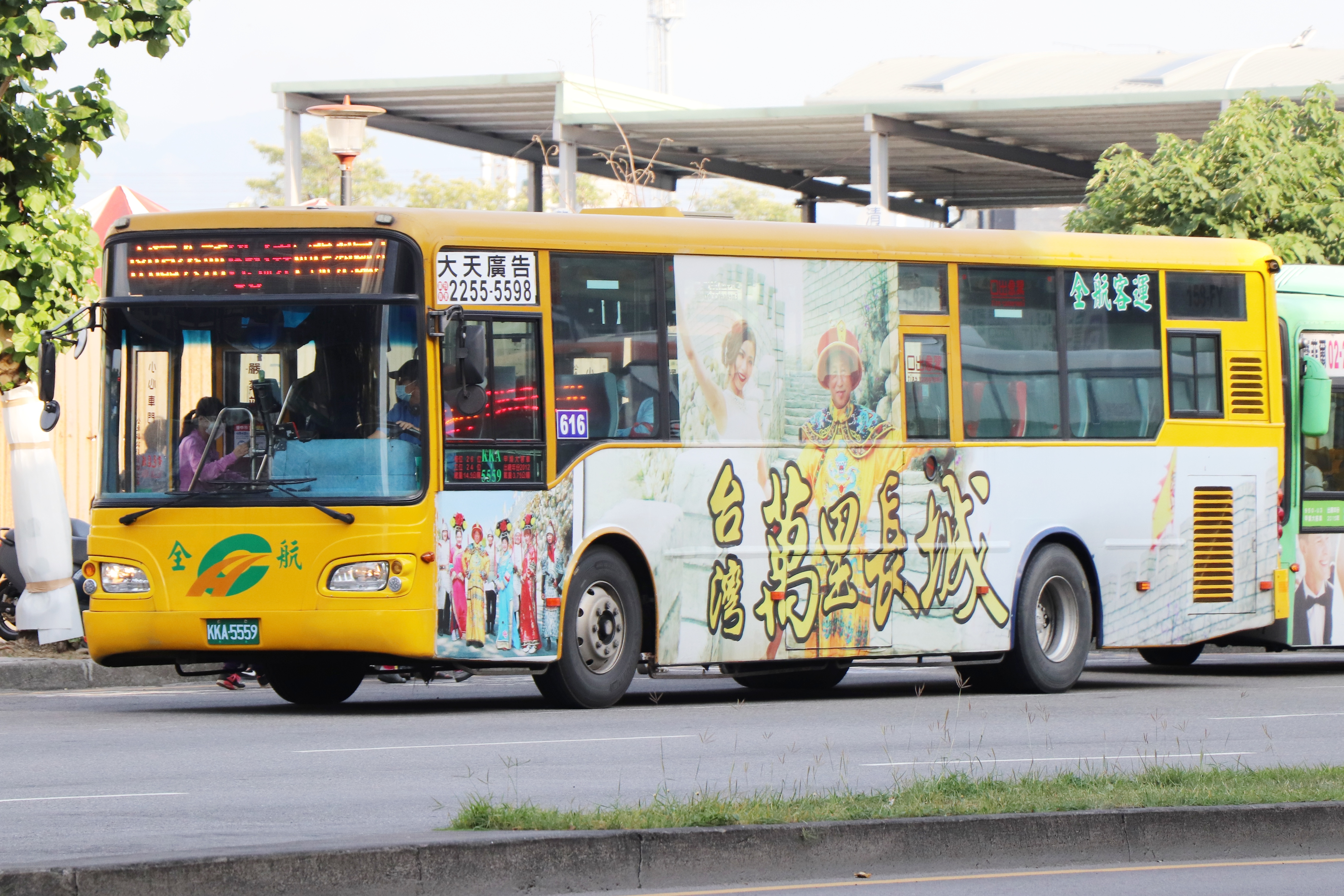 全航客運 HINO RK8JRSA大客車 KKA-5559